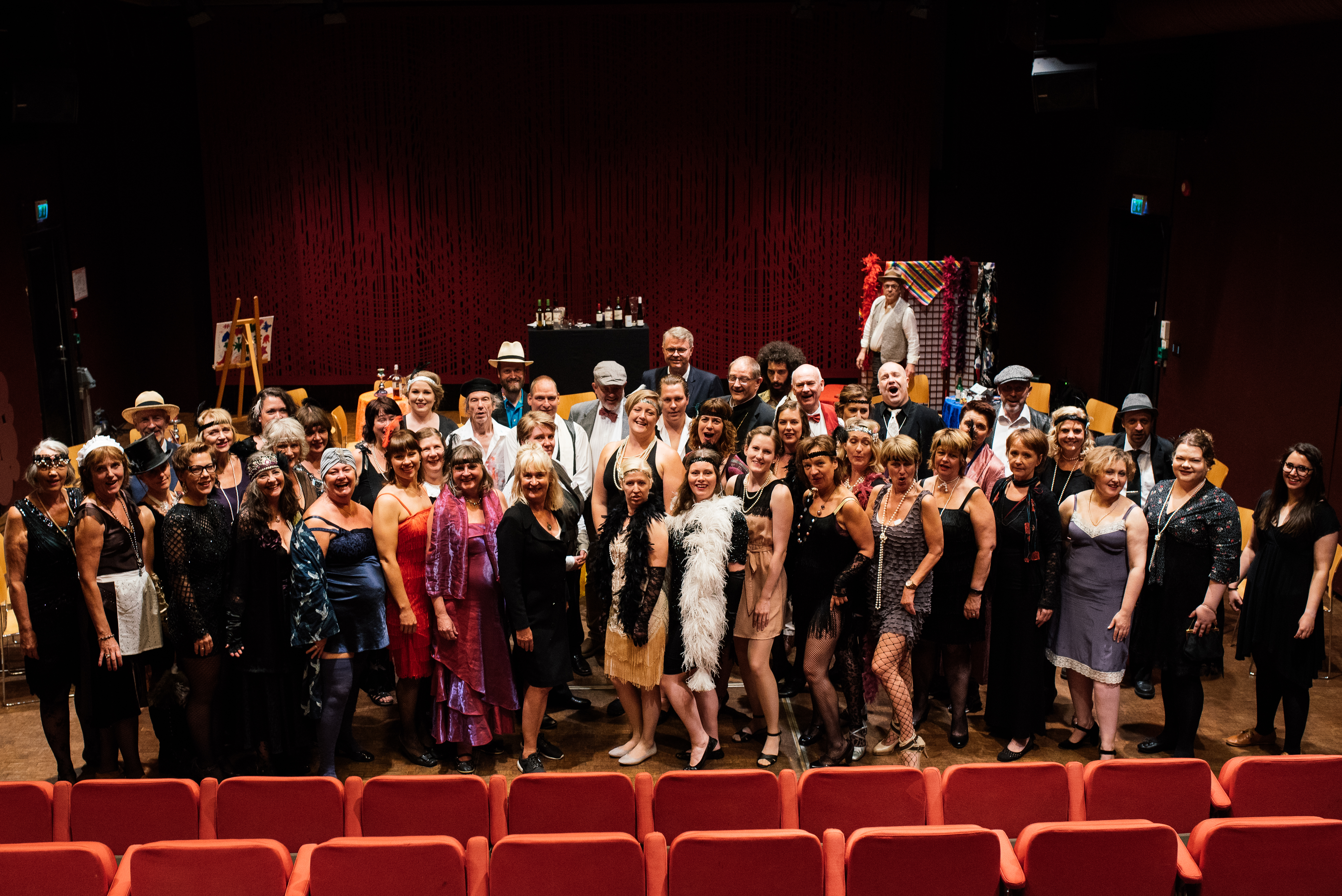 Skala Operakor under forestillingen Hvaduvil - en vaudeville på Litteraturhuset i Oslo i 2018